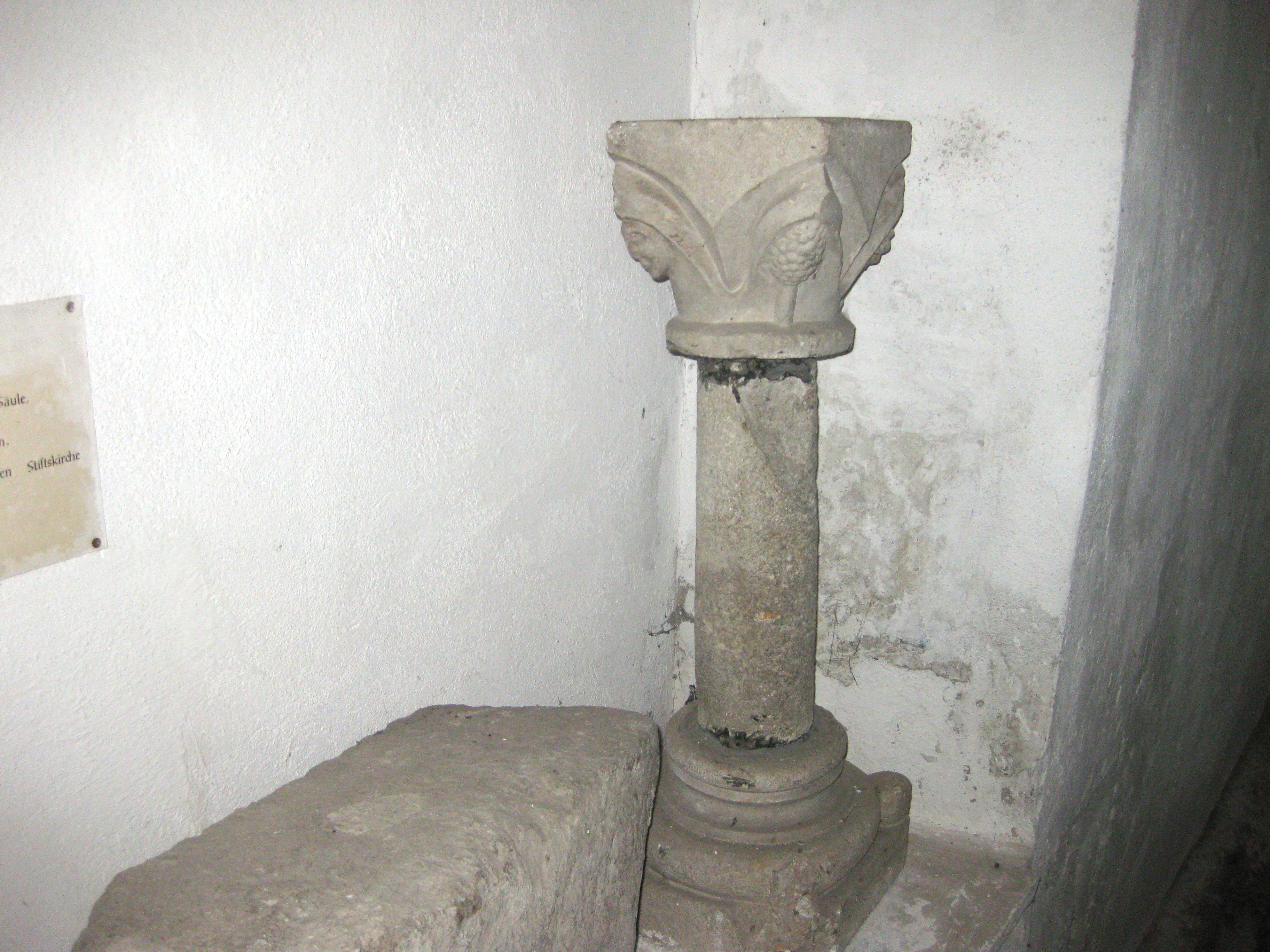 Romanische Säule der Vorgängerkirche, 11. Jh